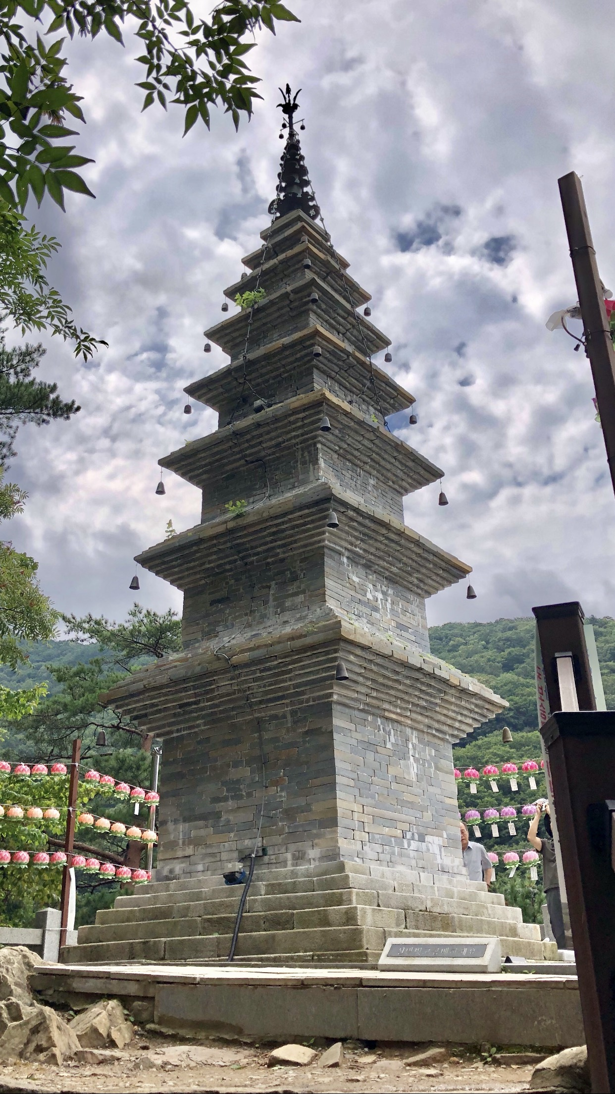 고한 정암사 수마노탑